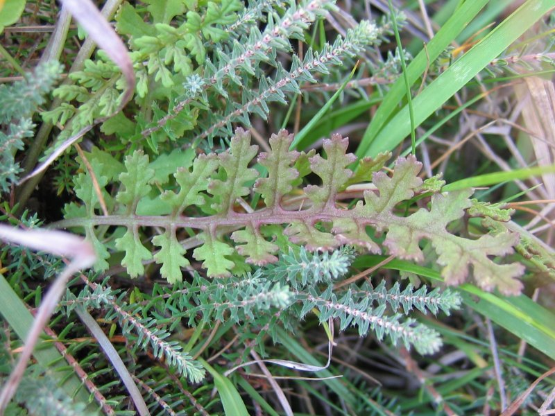 Wald-Läusekraut Pedicularis sylvatica, Hiddensee